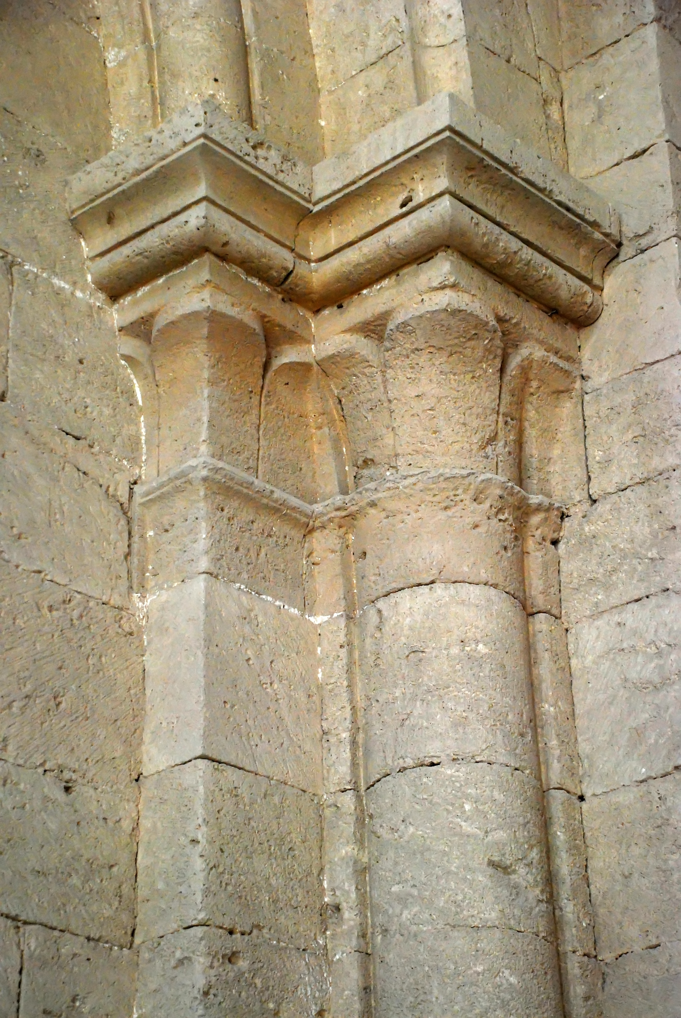 France - Provence - Abbaye de Silvacane